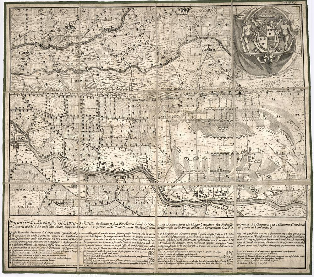 Piano della battaglia di Campo Santo dedicata a sua eccellenza il sig. Don Giovanni Buonaventura de Gages cavaliere del nobilissimo Ordine di San Gennaro e di San Giacomo, gentiluomo di Sua maestà il Re delle Due Sicilie, sergente maggiore ed ispettore delle Reali Guardie del Vallone, capitano generale delle armate di s.m.c. e comandante generale di quella di Lombardia, ecc.